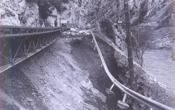 Aiguats del 1982, l'esvoranc provocat pel riu a Tres Ponts va ser superat provisionalment amb un pont militar.